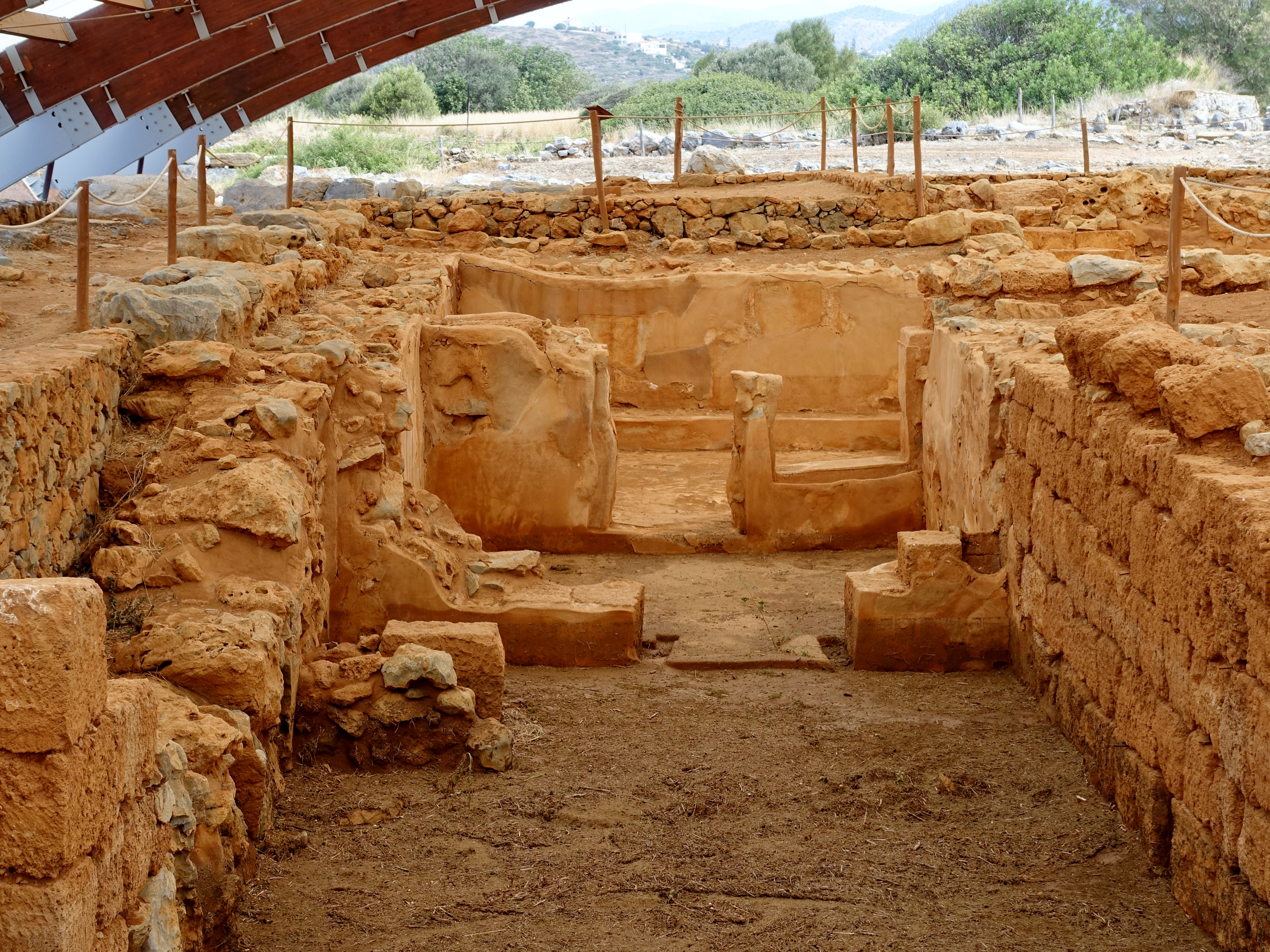 Pfeilerkrypta der Ausgrabungsstätte von Mallia (Μάλια), Gemeinde Chersonisos, Kreta, Griechenland